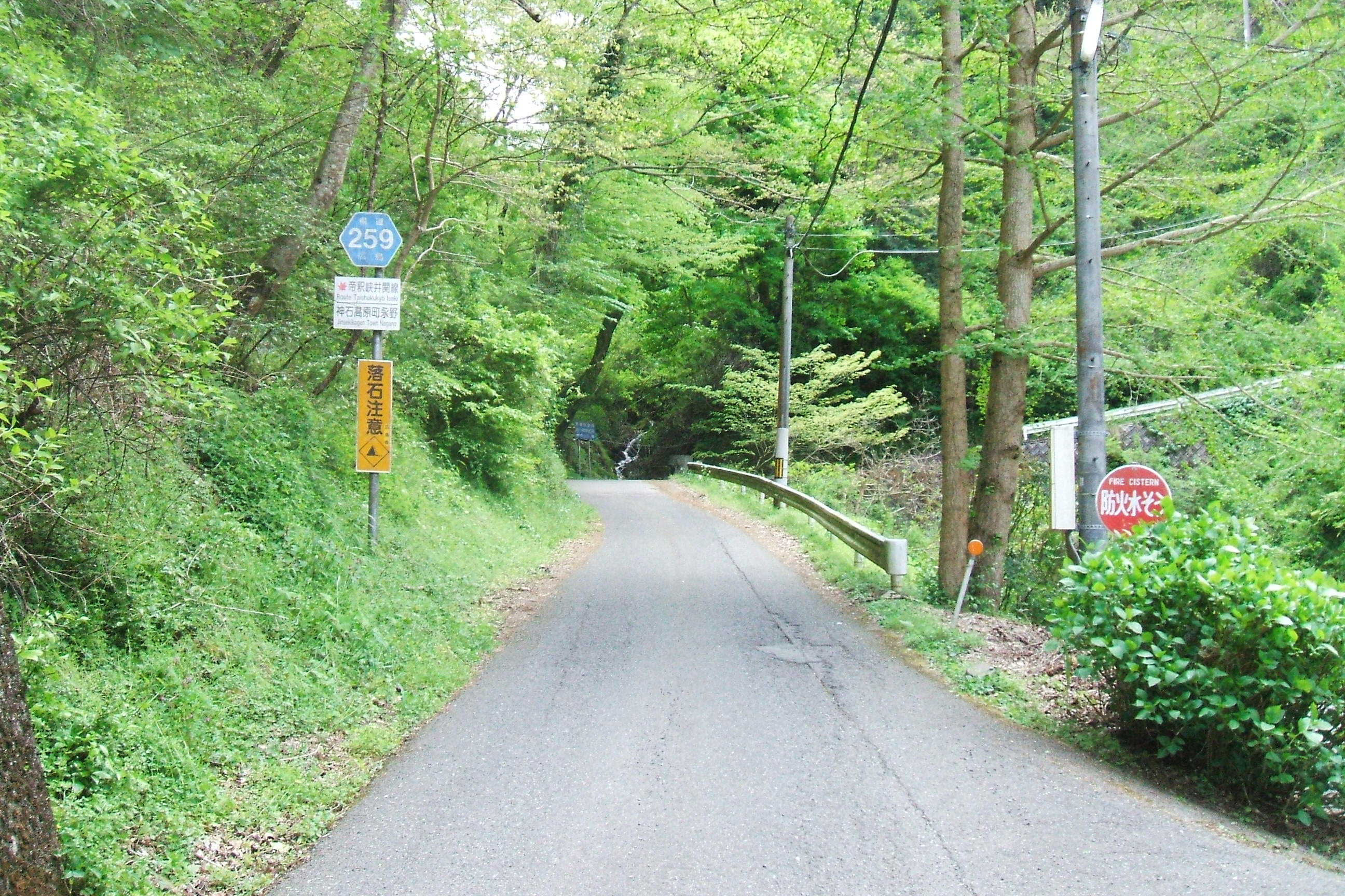 広島県神石郡神石高原町永野付近にある広島県道259号帝釈峡井関線と標識